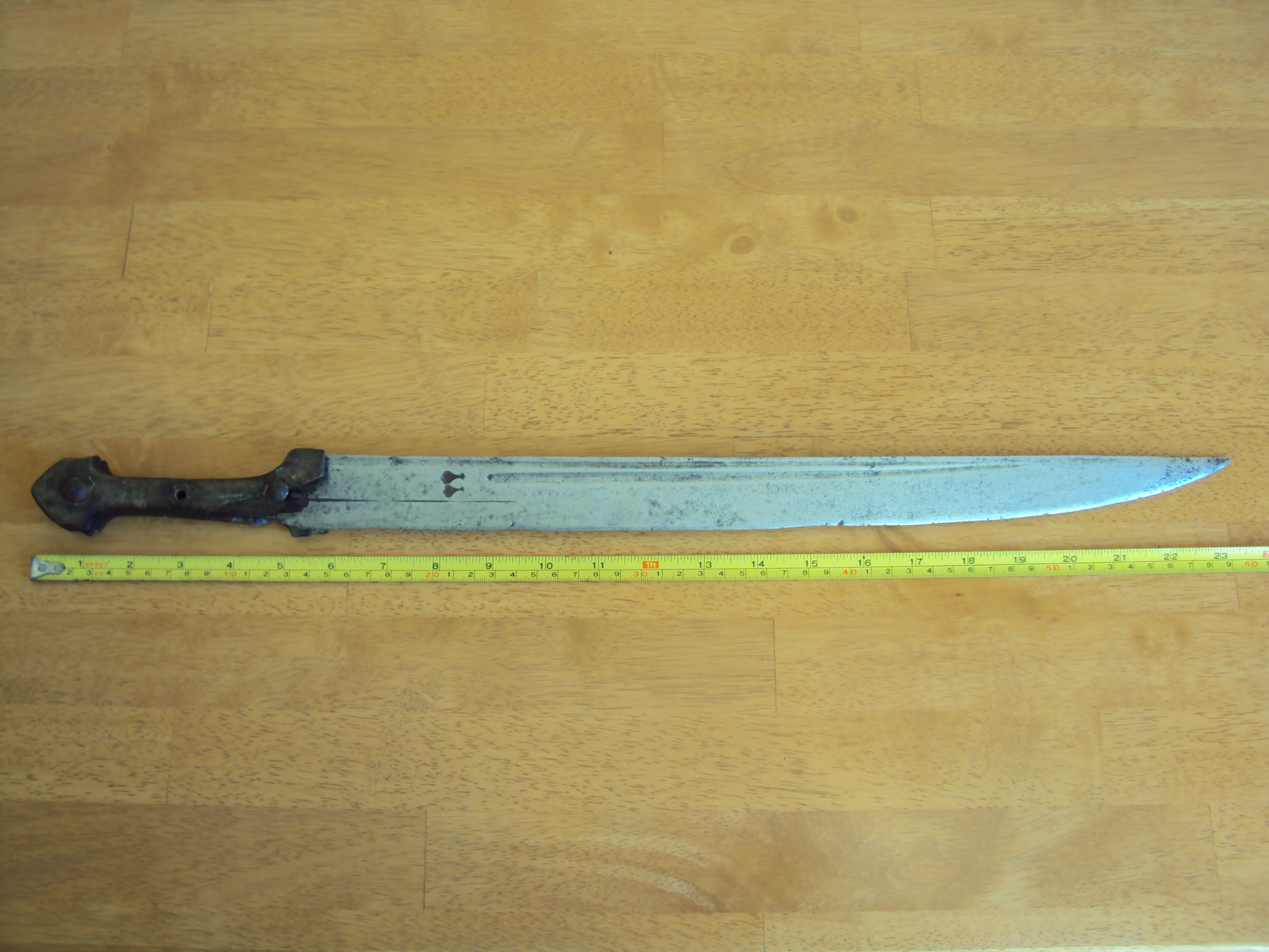 Oğuz rayonu ərazisində istehsal olunmuş qədim qılınc. Üzərində ustanın emblemi həkk olunmuşdur.